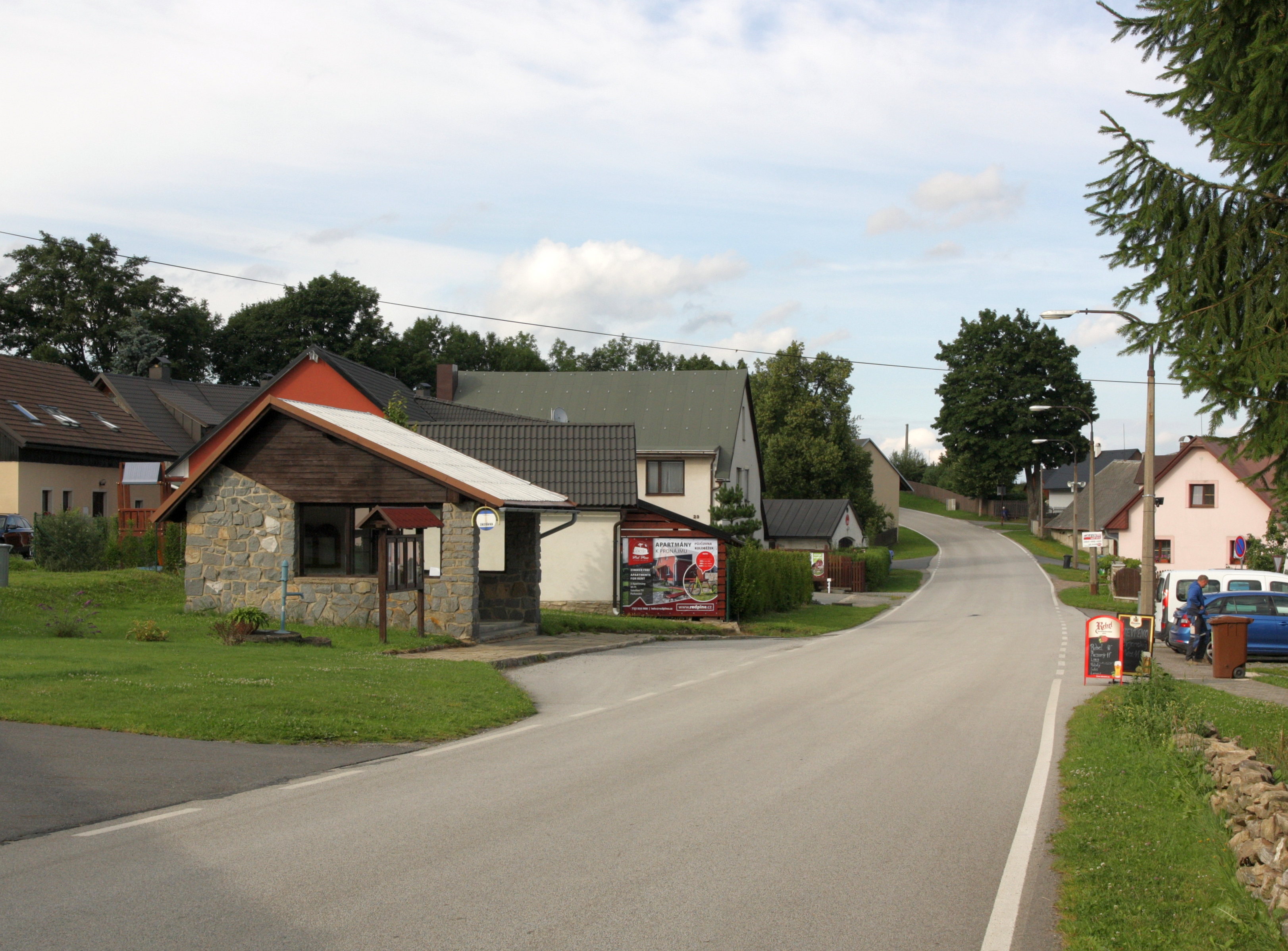 Vlachovice (okres Žďár nad Sázavou) - centrum obce.